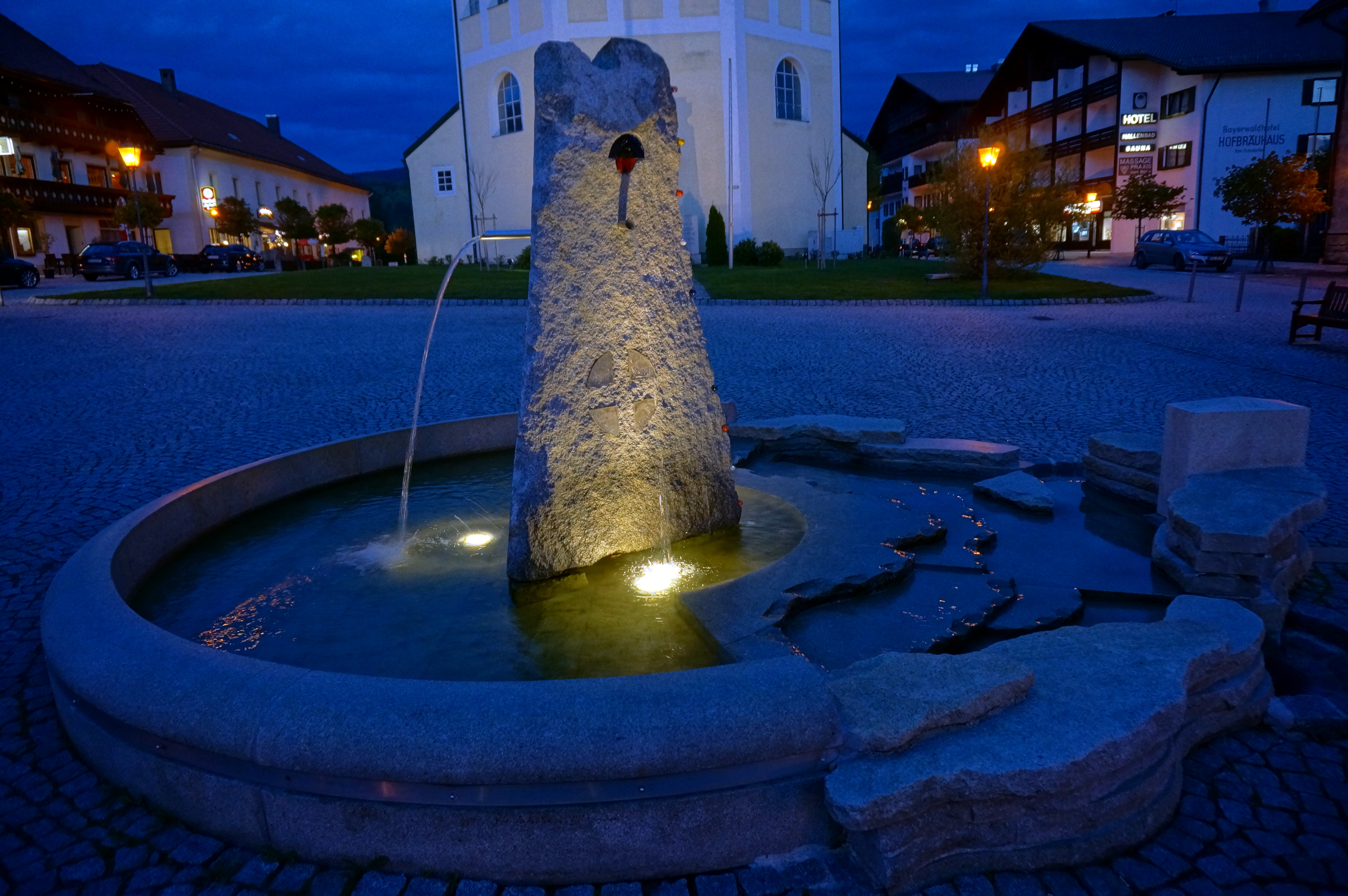 Deutschland, Bayern, Niederbayern, Landkreis Regen, Bodenmais, Brunnen am Marktplatz von dem Künstler Gerhard Kadletz, eingeweiht im August 2010